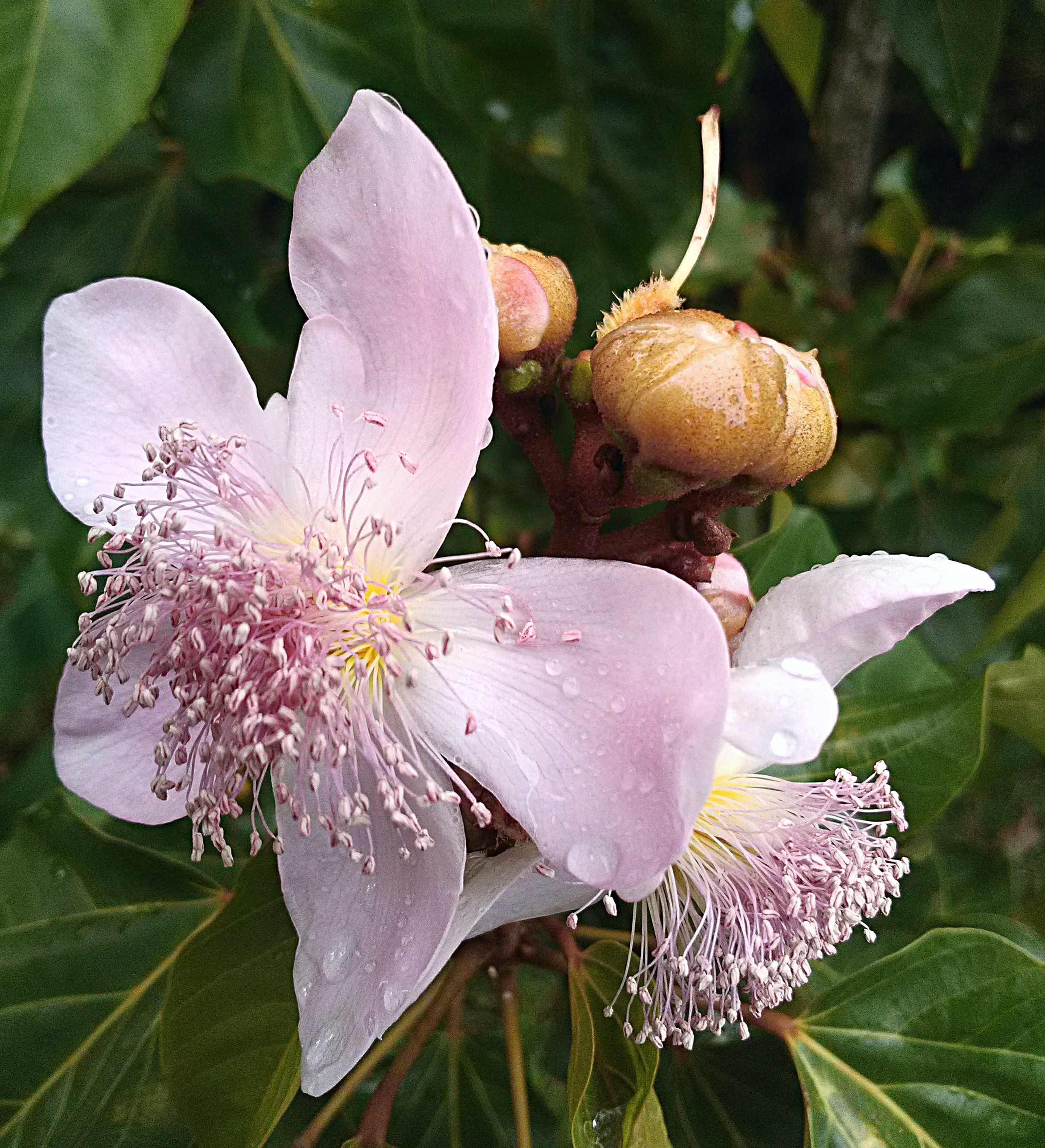 Fleurs du Roucouyer